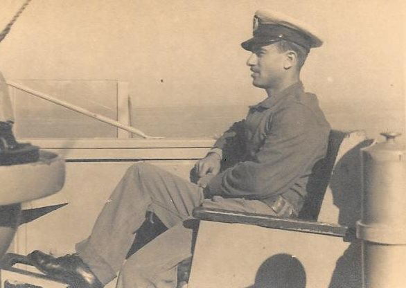 אליהו ריקה רוכש נסיון ימי על גשר הפריגטה אח"י מבטח (ק-28) בהפלגה לאיי קאבו ורדה וטולון.